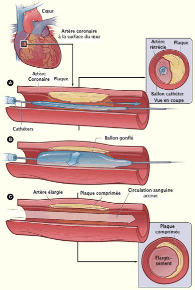 Schéma explicatif d'une intervention d'expension d'une artère coronaire par gonflement in situ d'un ballon Traduction en français de l'illustration du wikipedia en englais